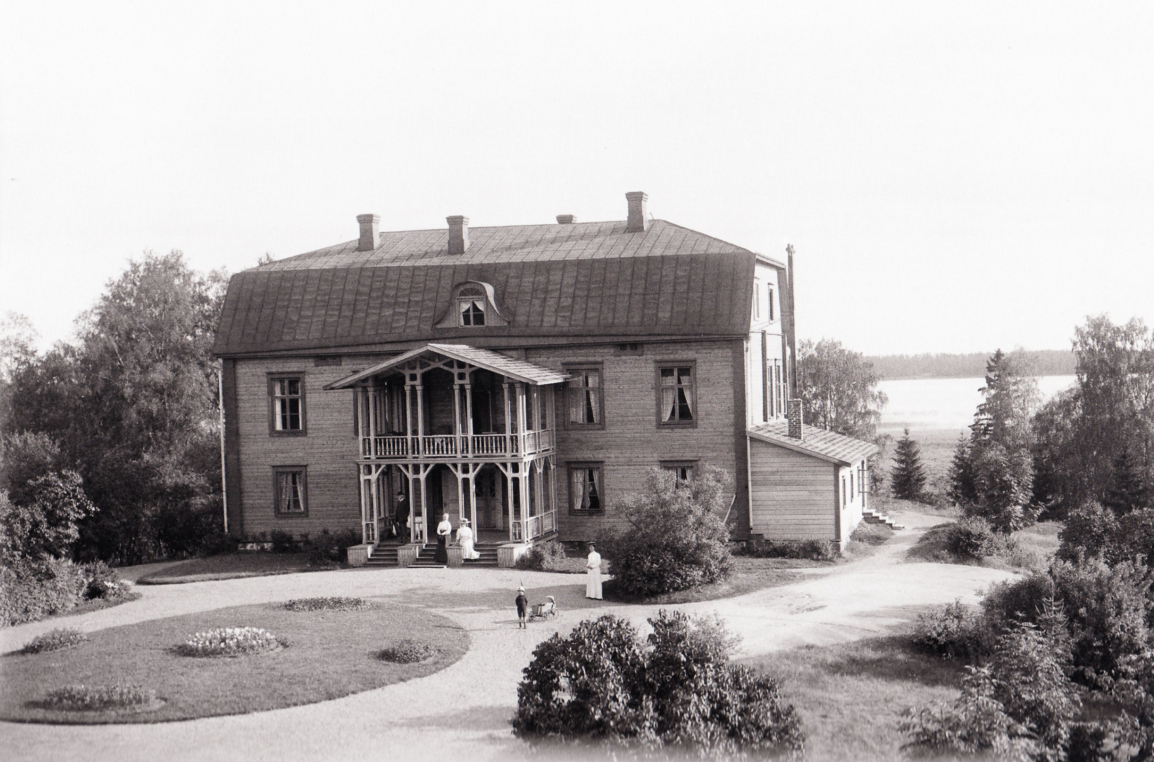 wredebyn kartano